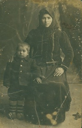 Жена от с. Чифлик Мусу бей (Долен извор), Добричко, със сина си.